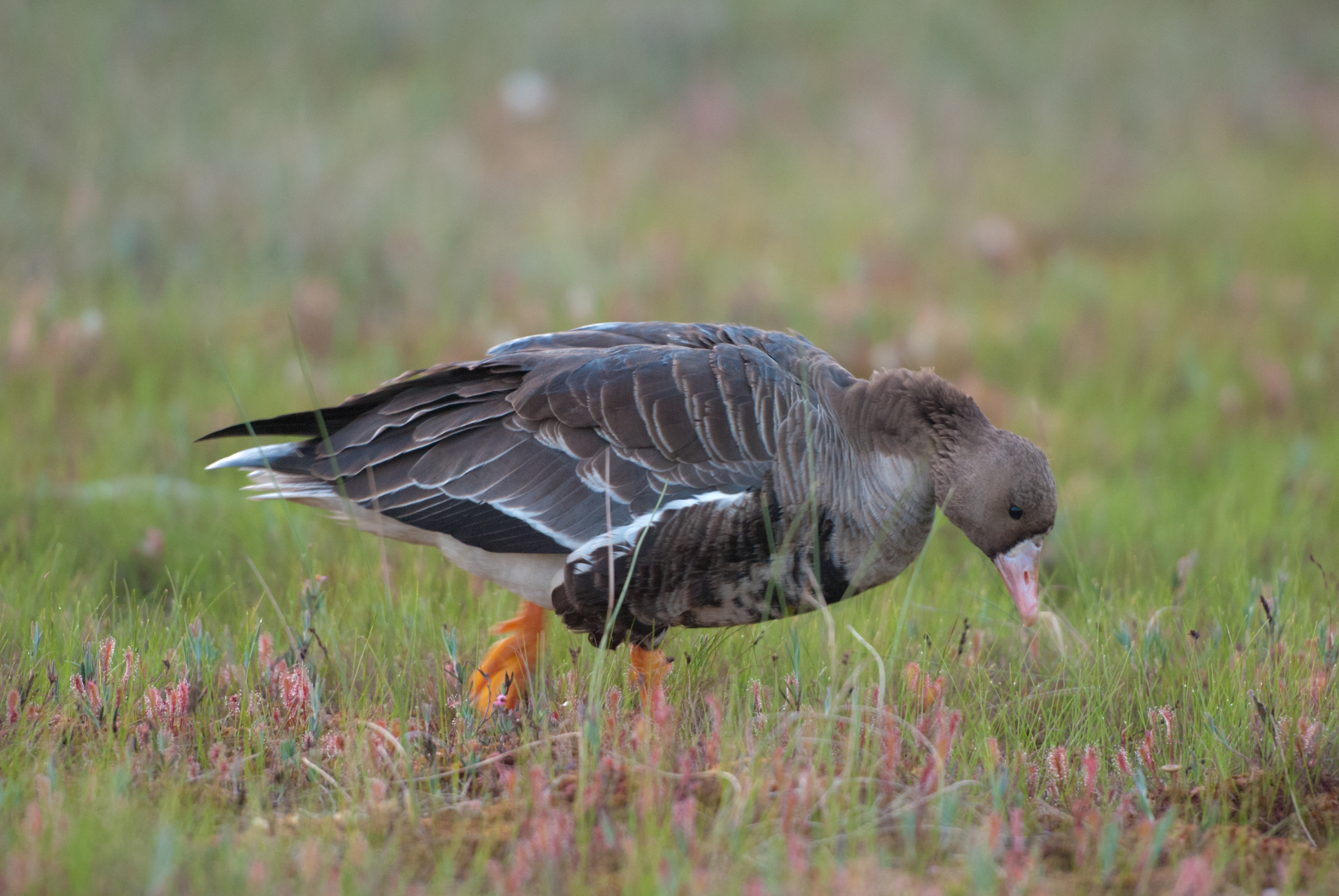 Hallhani